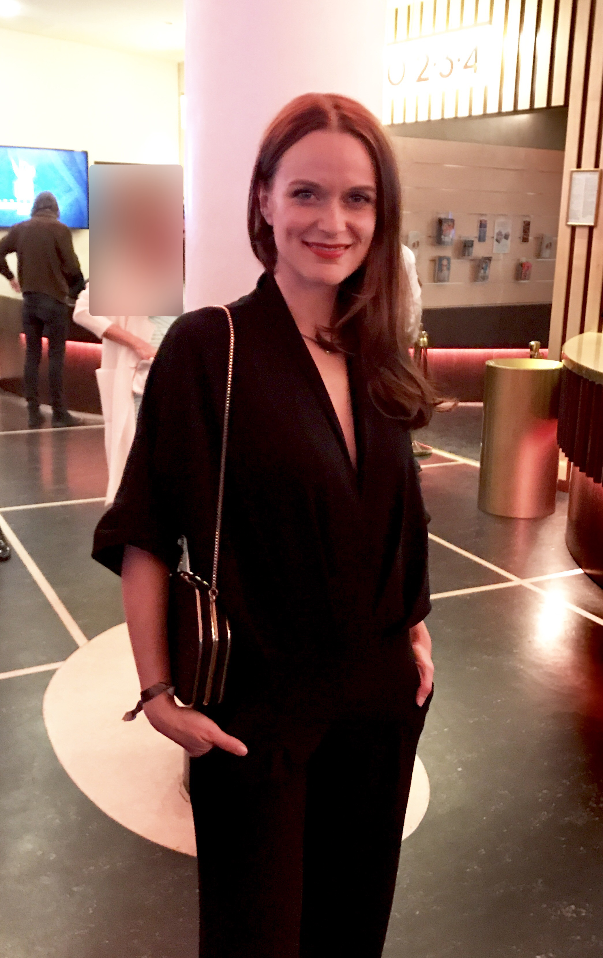 Deutscher Schauspielerpreis, 2017 / Berlin